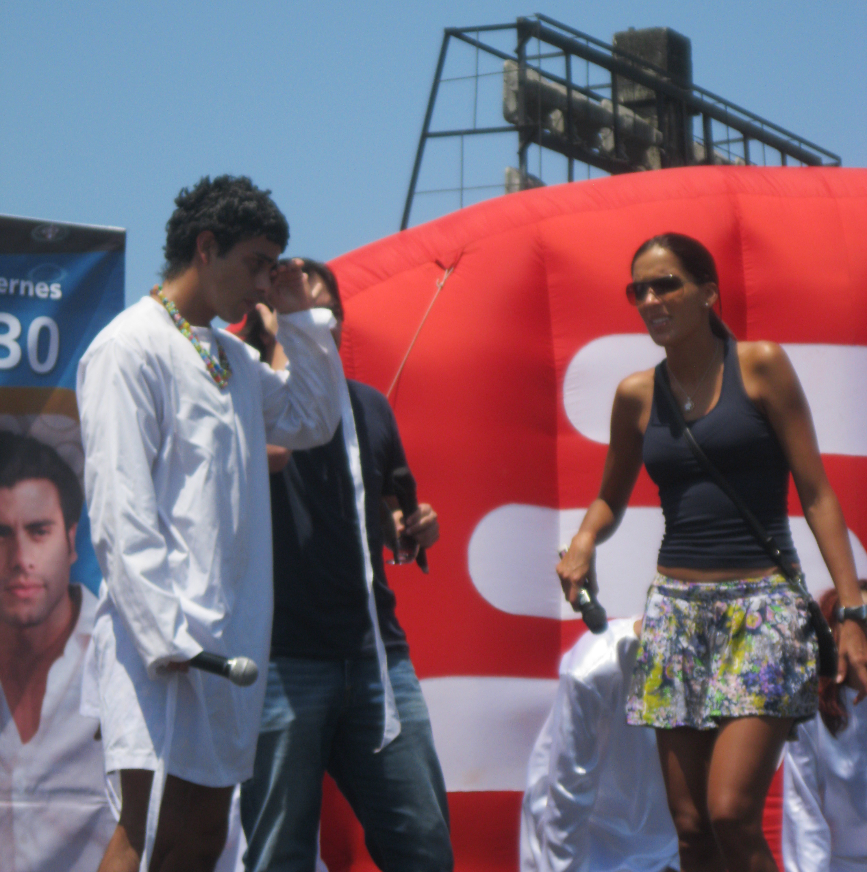 Efraín Ruales como Lorenzo con María Teresa Guerrero junto al equipo de En Contacto en 2012, en el parque Forestal de la ciudad de Guayaquil.